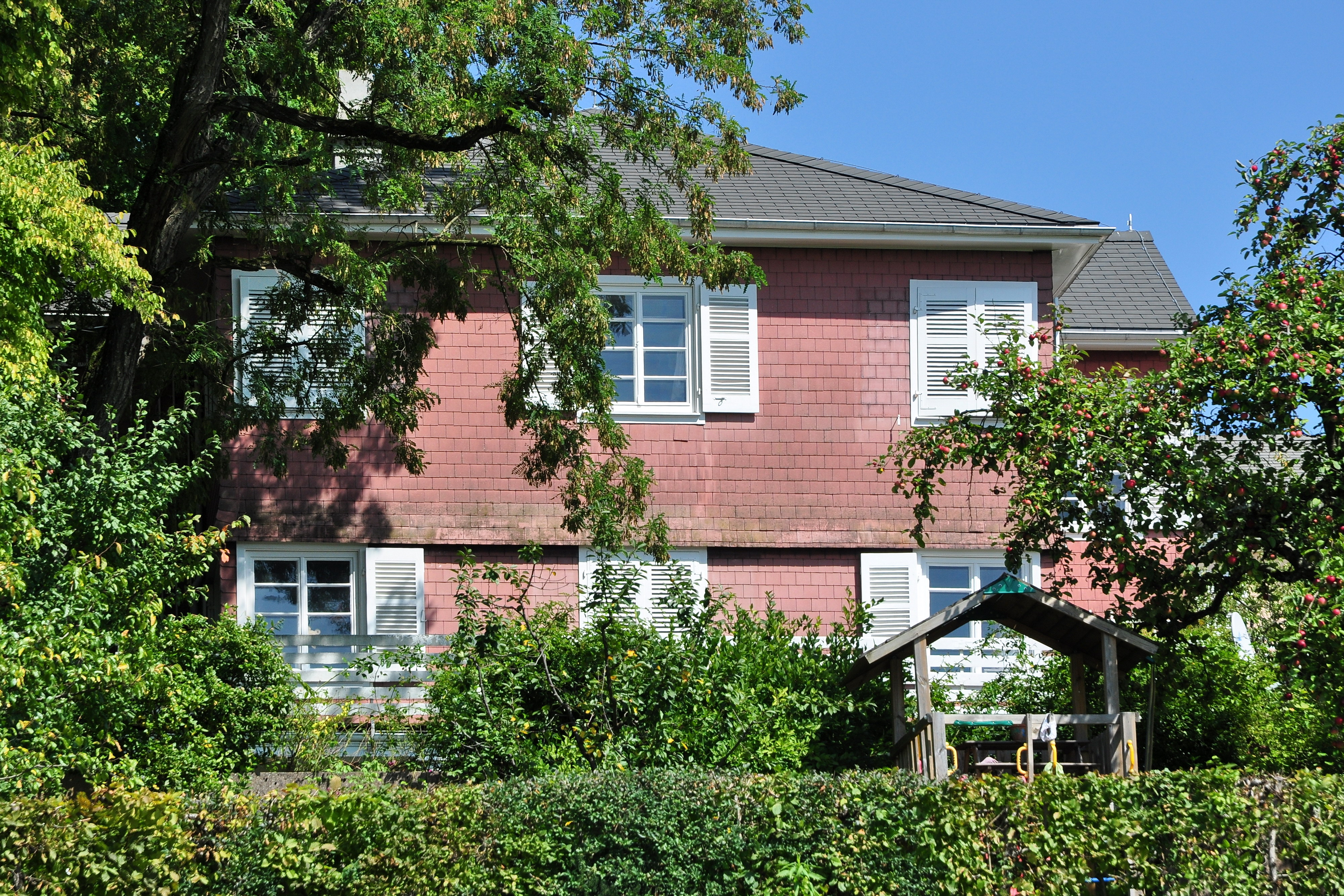 Eigenheim Lux Guyer ‹Sunnebüel›, Am Itschnacherstich 1 in Küsnacht (Switzerland)